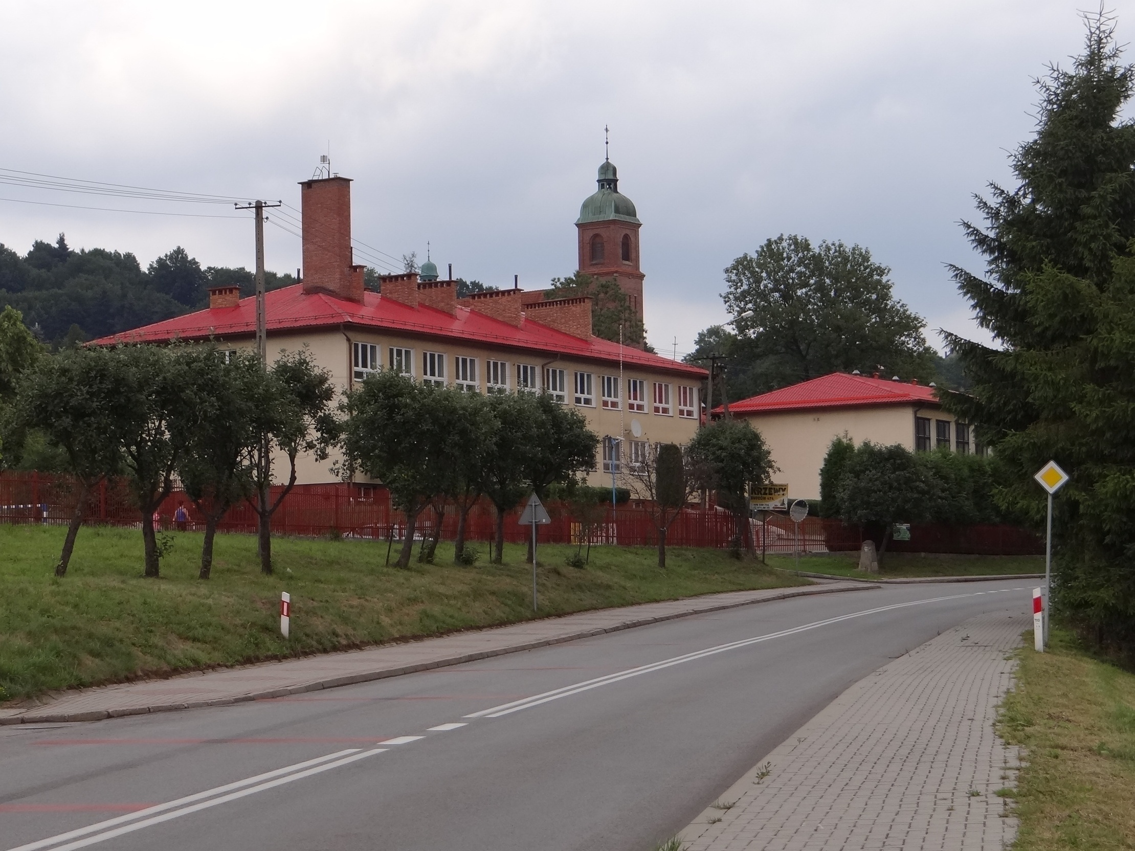 Budzów. szkoła